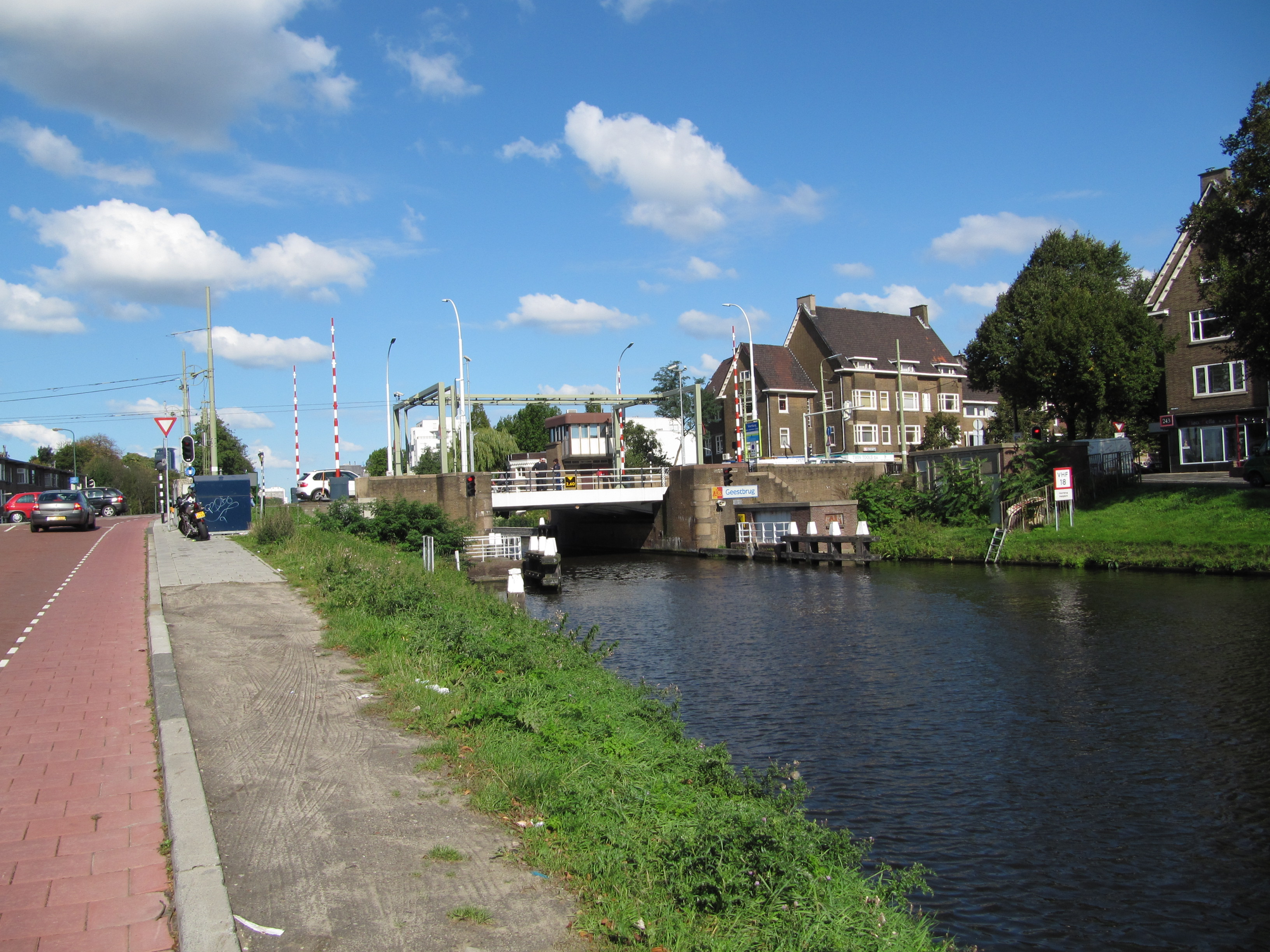 Geestbrug